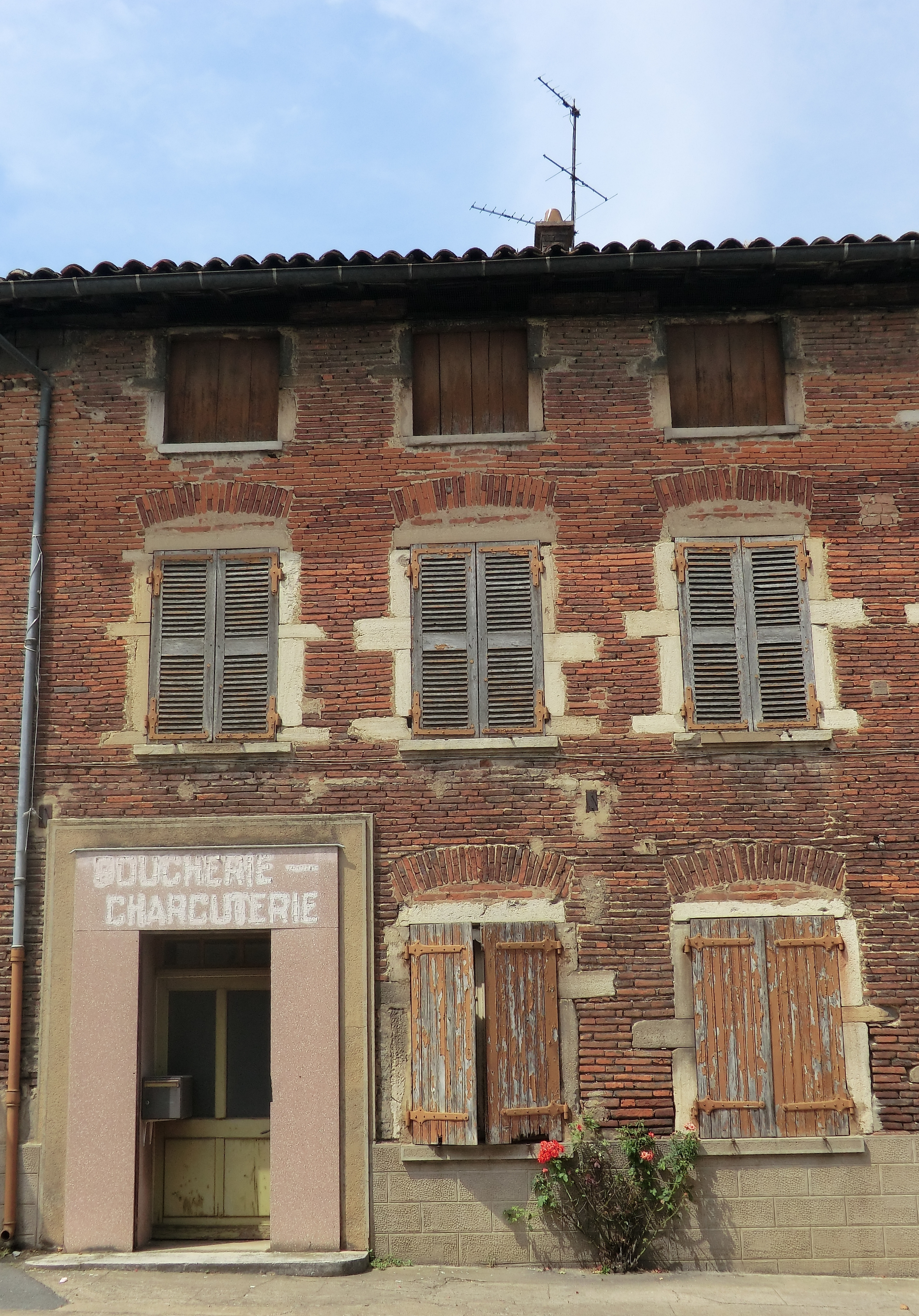 Maison à Villeuneuve (Ain) - boucherie fermée.